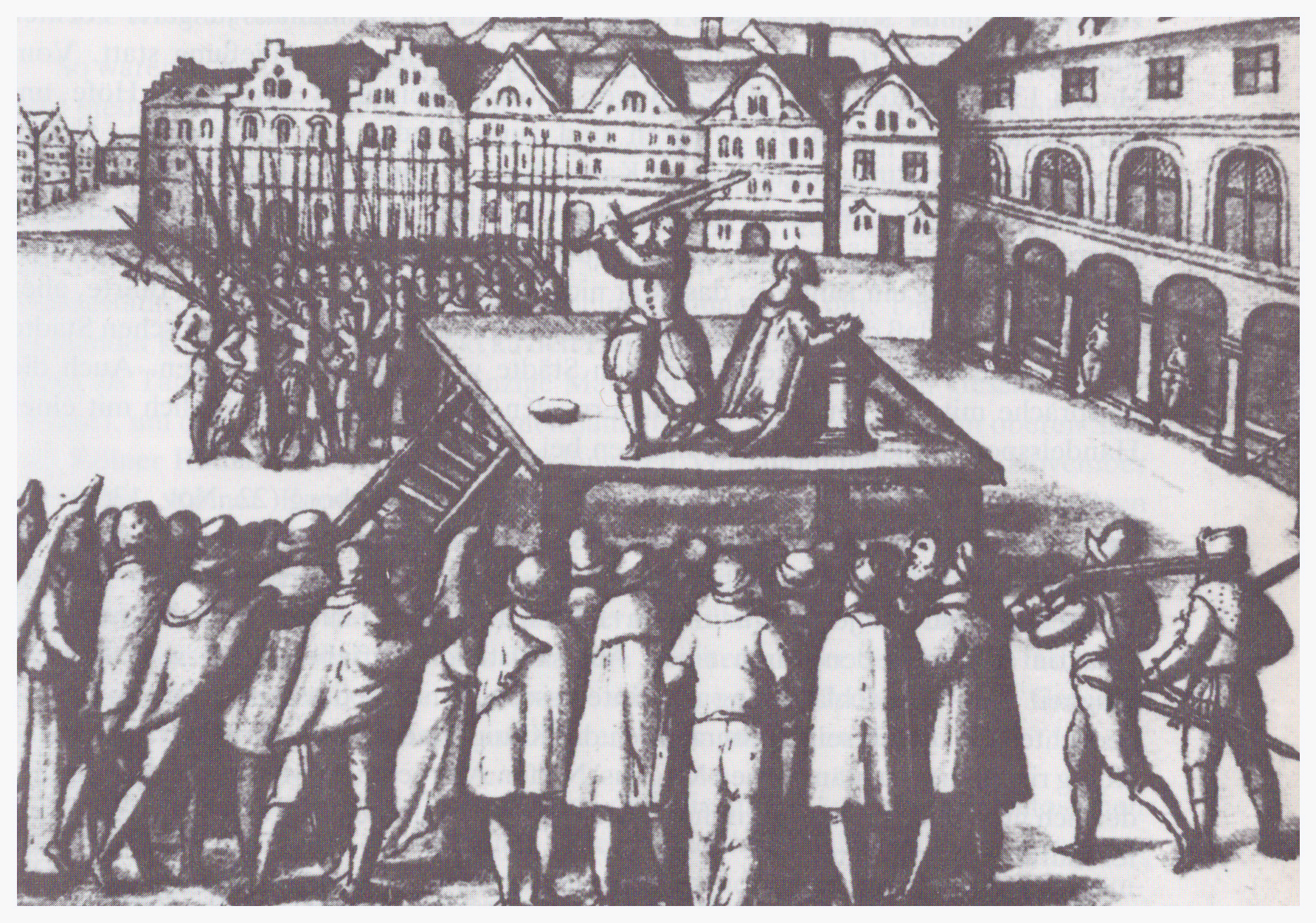 Hinrichtung des Lübecker Bürgermeisters Johann Wittenborg auf dem Lübecker Markt 1363. Darstellung aus der Lübecker Rehbein Chronik um 1620.